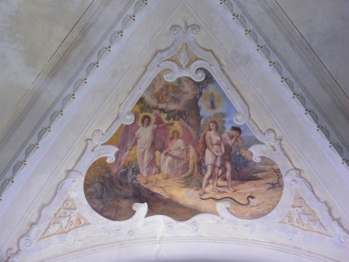 Kostel Navštívení Panny Marie v Lobendavě, strop